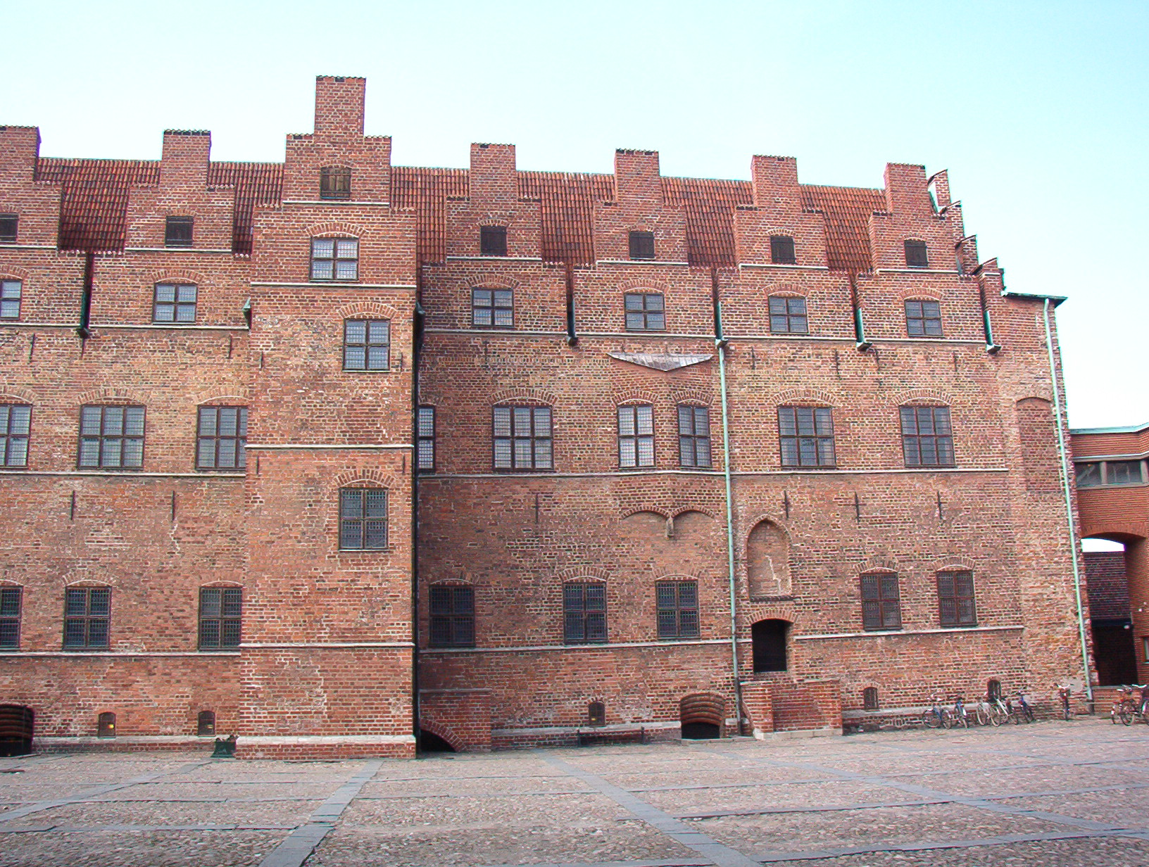 Inifrån borggården